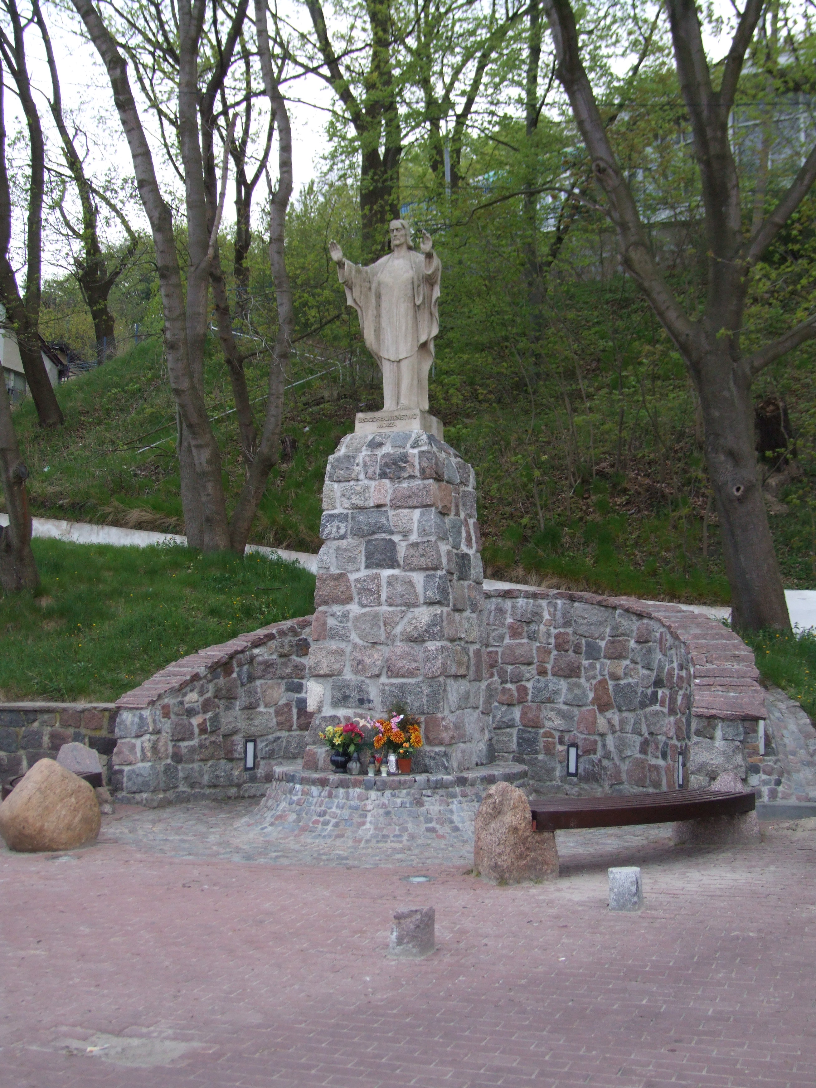 Figura Jezusa Chrystusa Błogosławieństwo Morza, Gdynia